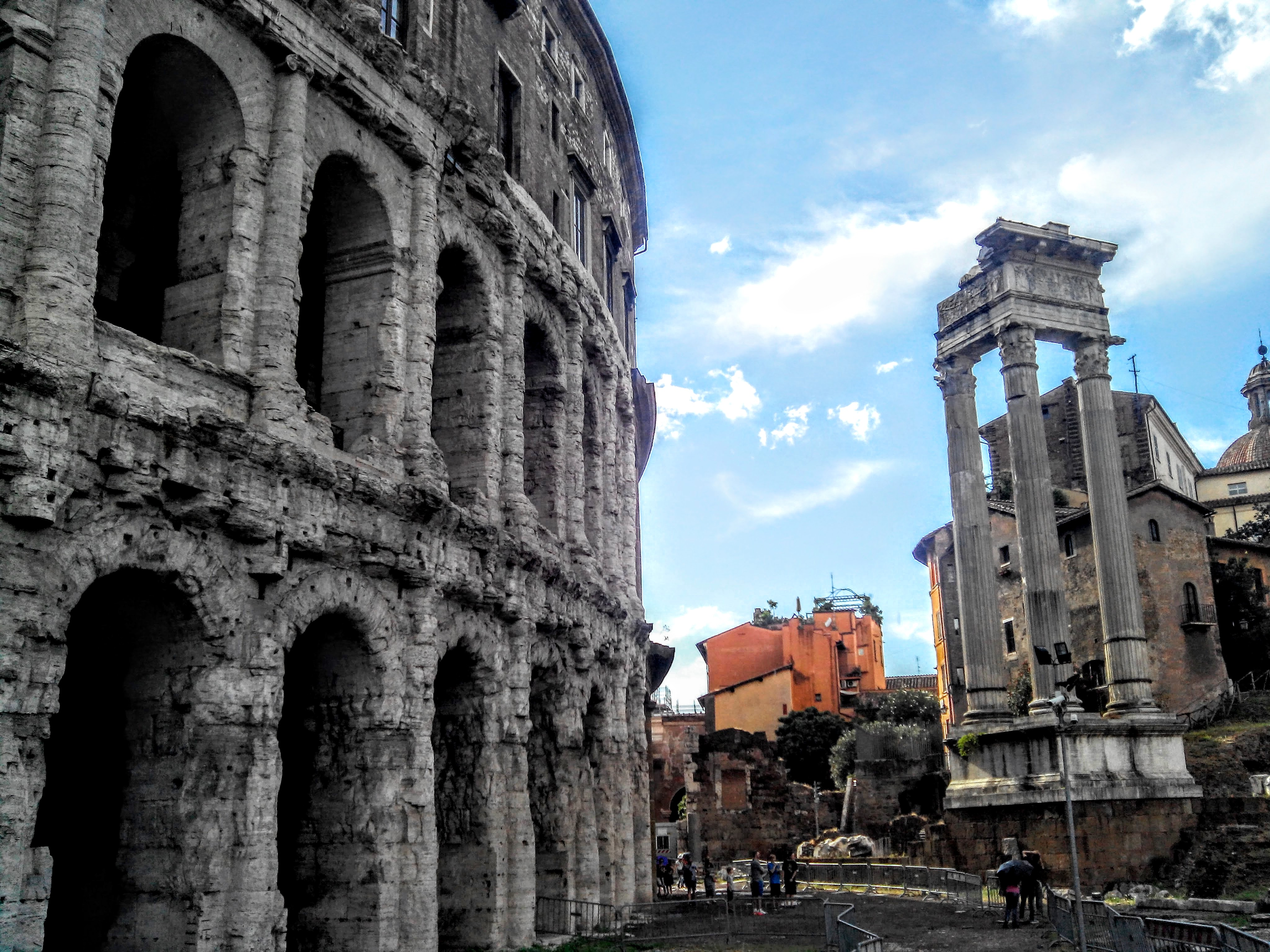 O Teatro de Marcelo, à esquerda e, à direita, as três colunas do Templo de Apolo Sosiano.